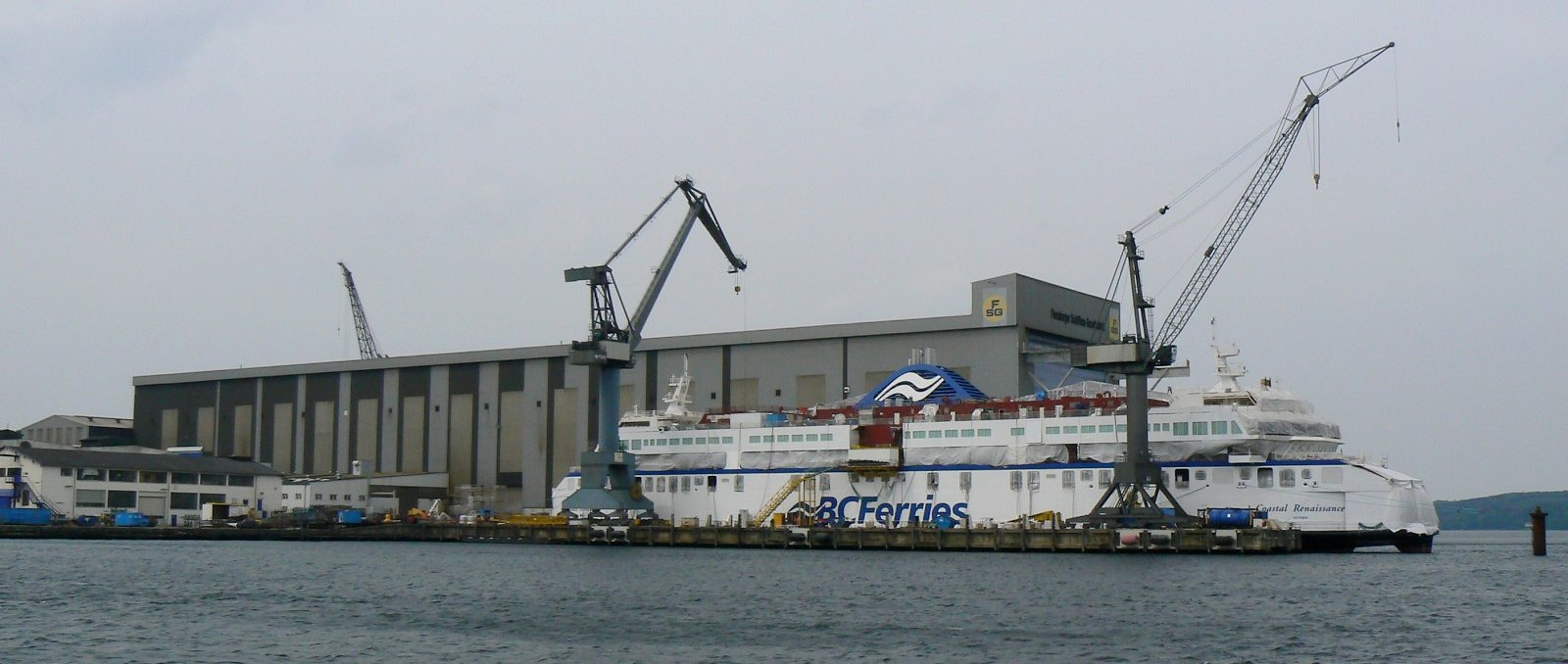 Werft der Flensburger Schiffbau-Gesellschaft mit der im Bau befindlichen Fähre MV Coastal Renaissance (BC Ferries). IMO Number: 9332755 MMSI Number: 316011407 Callsign: CFN4888 Length: 160 m Beam: 28 m